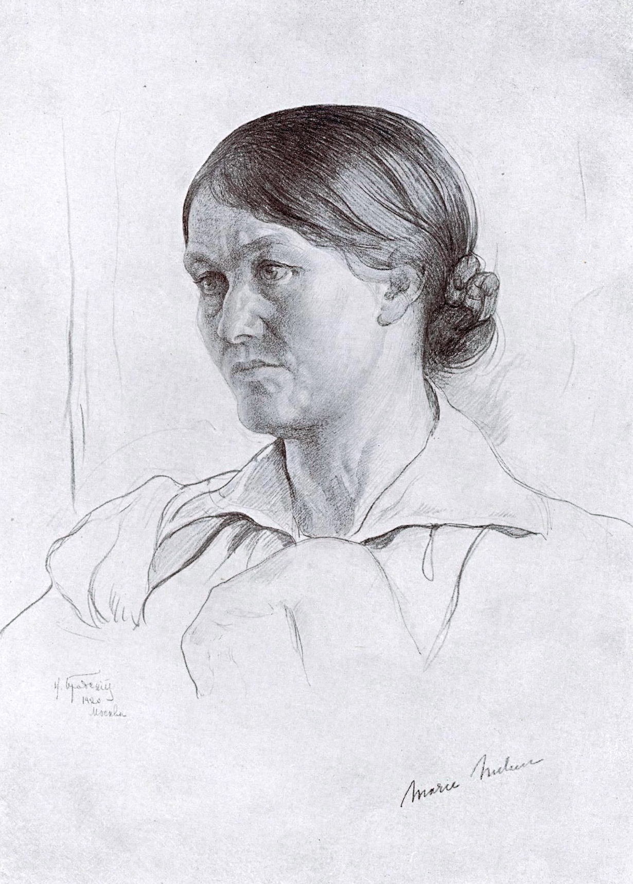 Нильсен, Мария